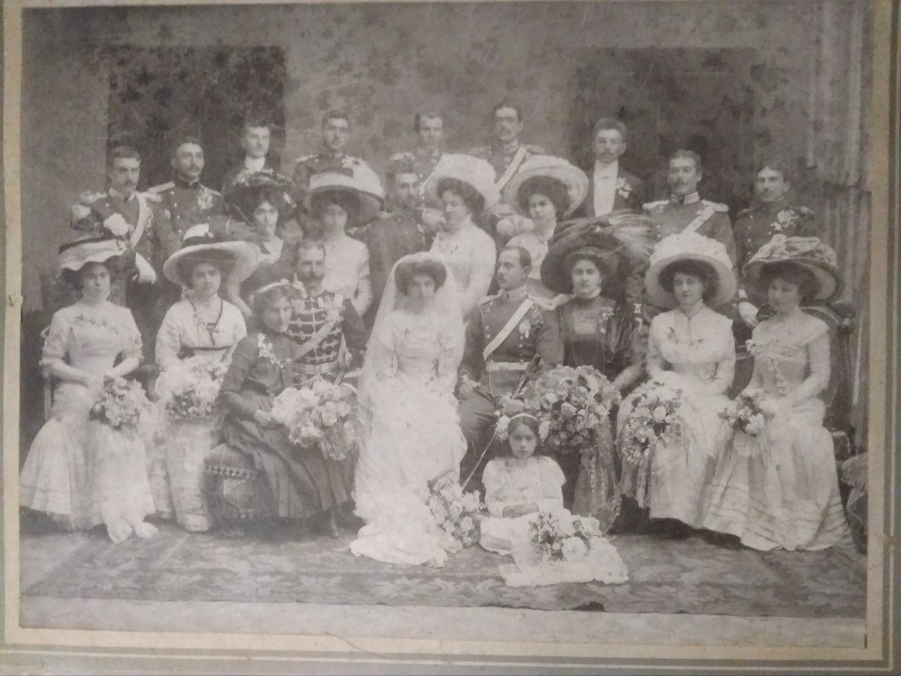 Сватбена фотография на подполковник Никола Карагьозов и Райна Винарова